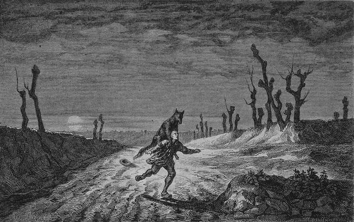 Salon de 1857. Peinture. — Le Loup-Garou, par M. Maurice Sand.